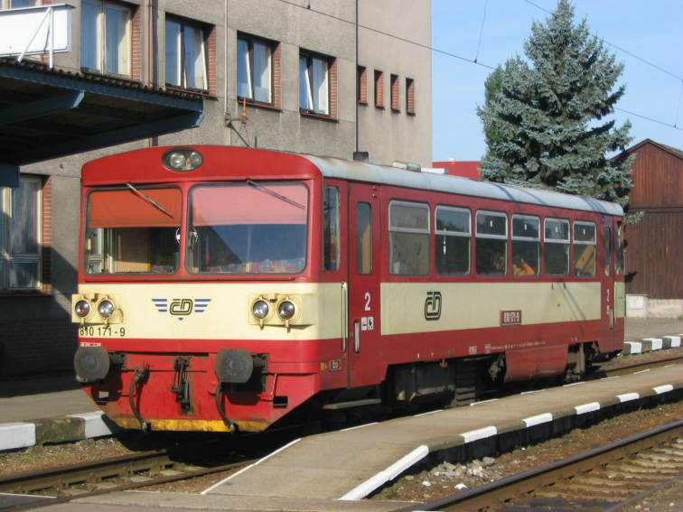 Motorový vůz řady 810, stanice Chlumec nad Cidlinou